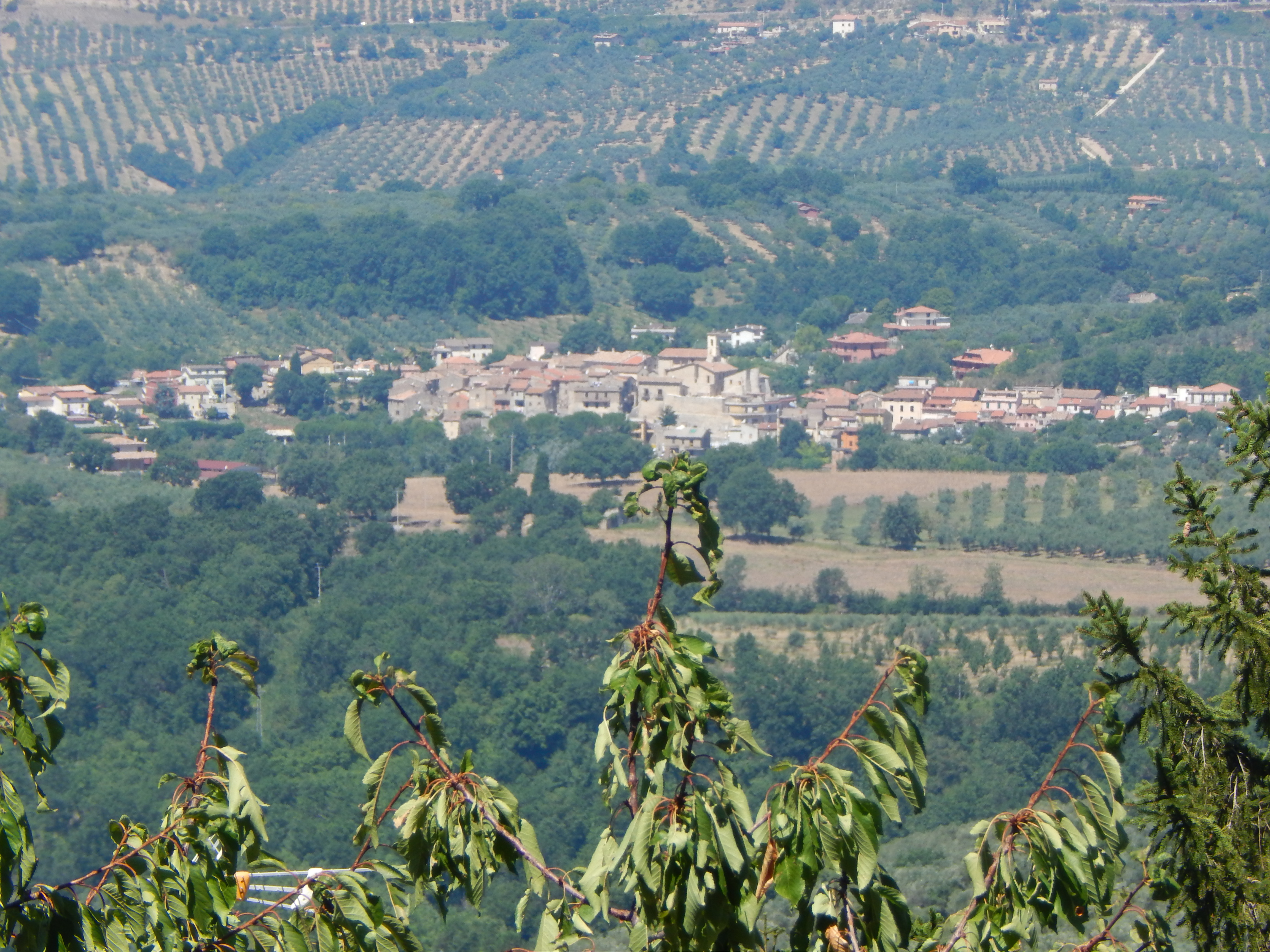 Ponticelli Sabino, frazione di Scandriglia (provincia di Rieti, Lazio)